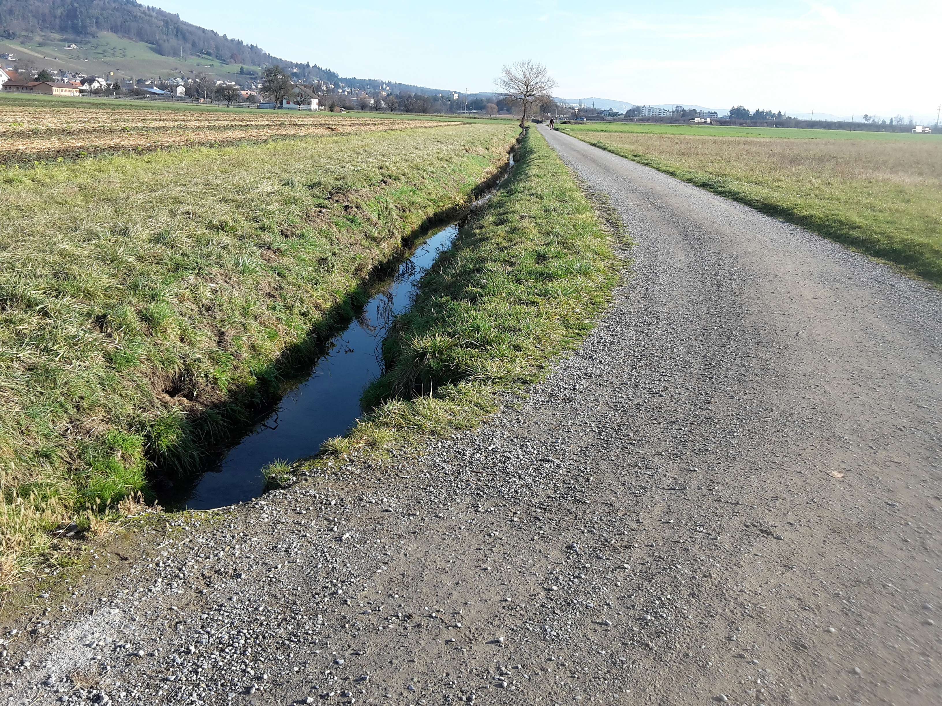 Der Länggenbach bei Rugg direkt vor der Unterquerung des Baderströsslis mit Weiningen ZH im Hintergrund